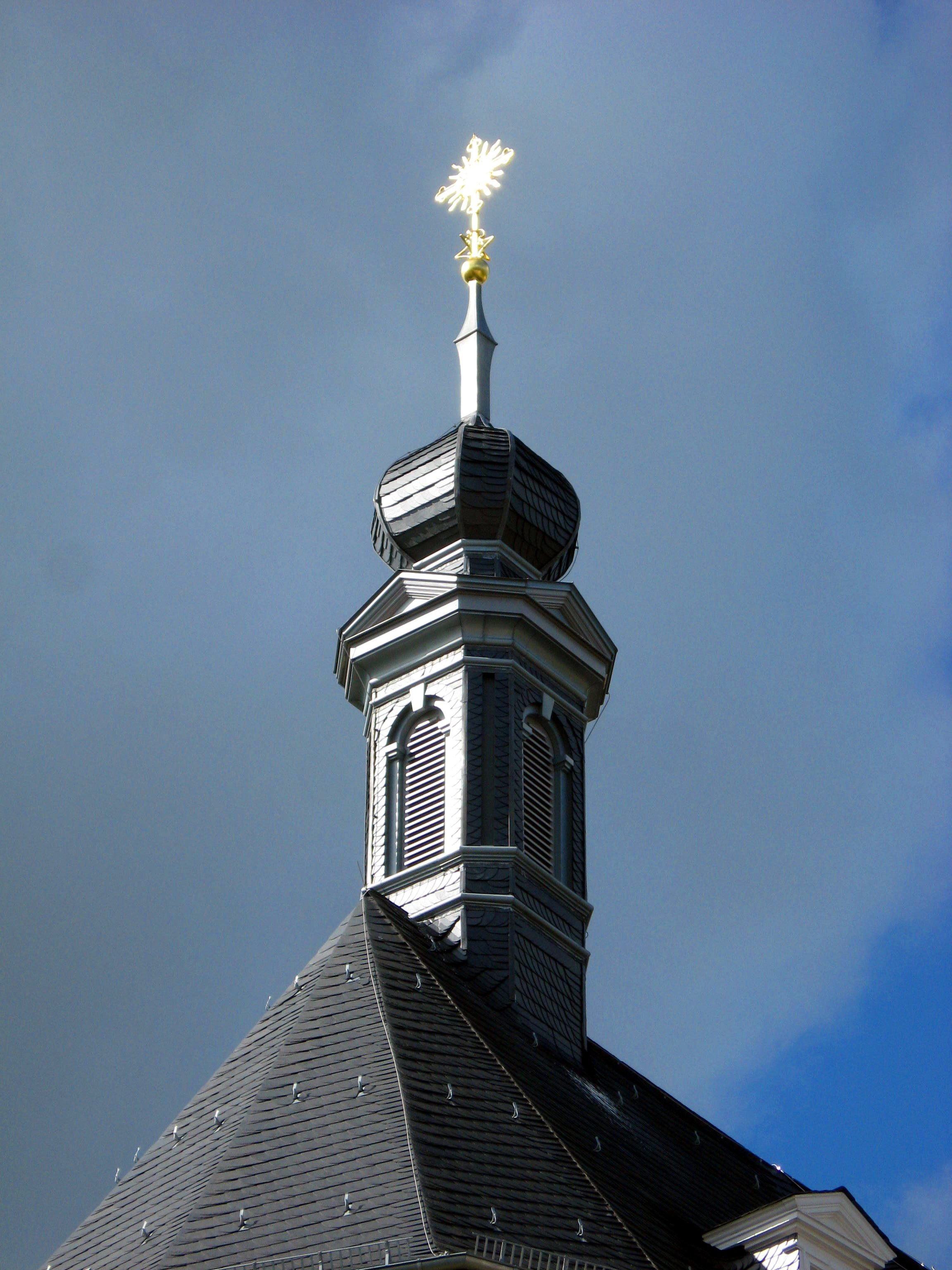 Turmspitze der Schlosskirche (Blieskastel)